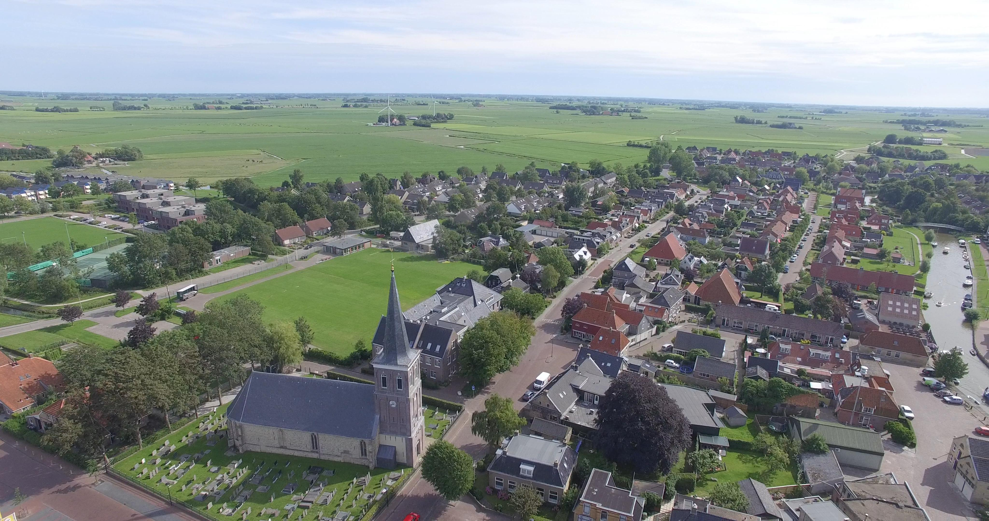 Wommels